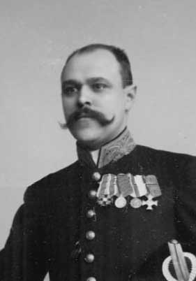 Михаил Григорьевич Кривошлык